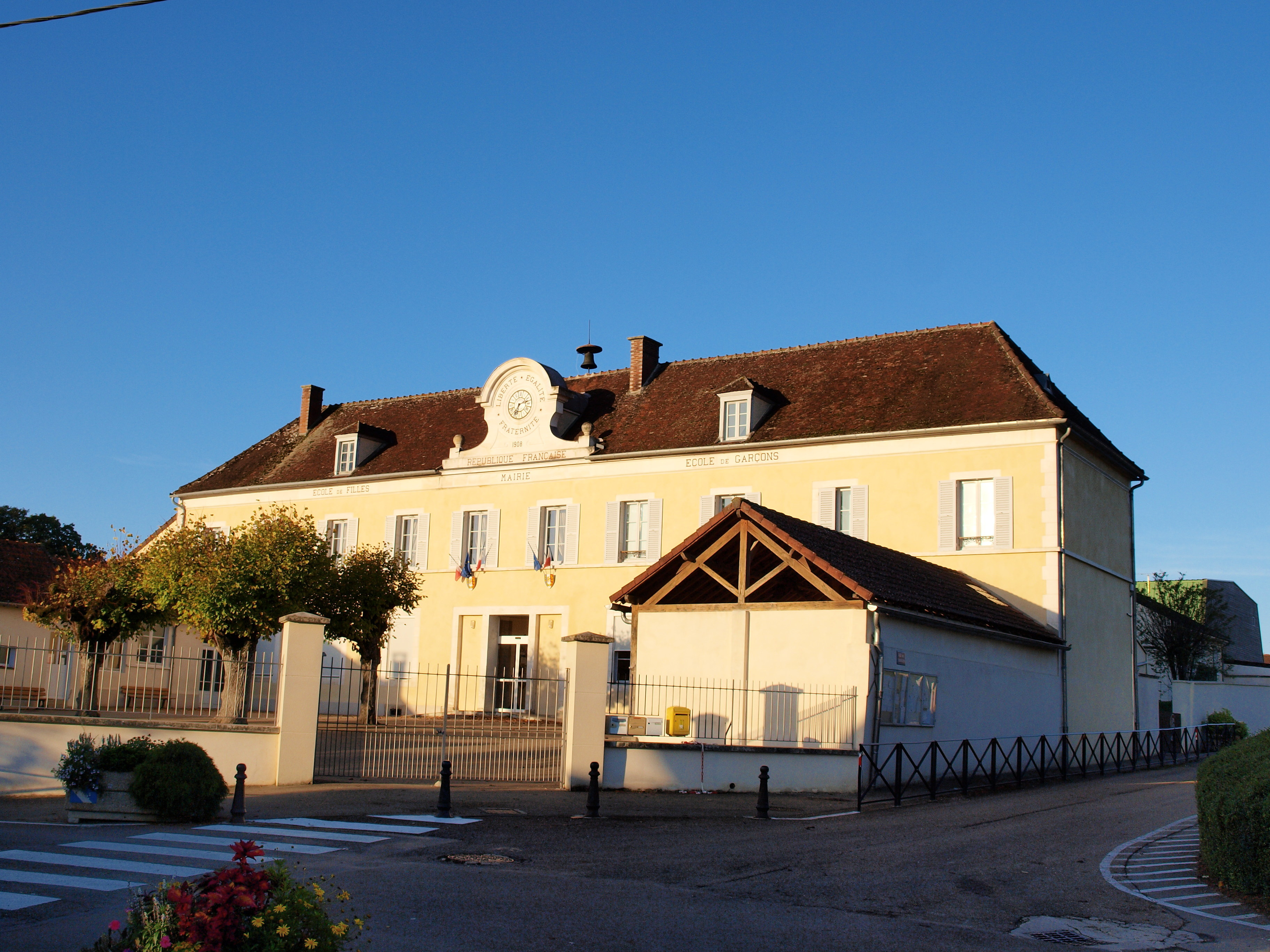 Charbuy (Yonne, France) ; la mairie.